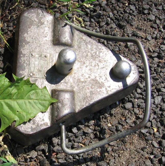 Żabka niwelacyjna - przyrząd geodezyjny wykorzystywany w niwelacji mający uchronić przed osiadaniem łaty niwelacyjnej na nieutwardzonym podłożu. Producent Polskie Zakłady Optyczne